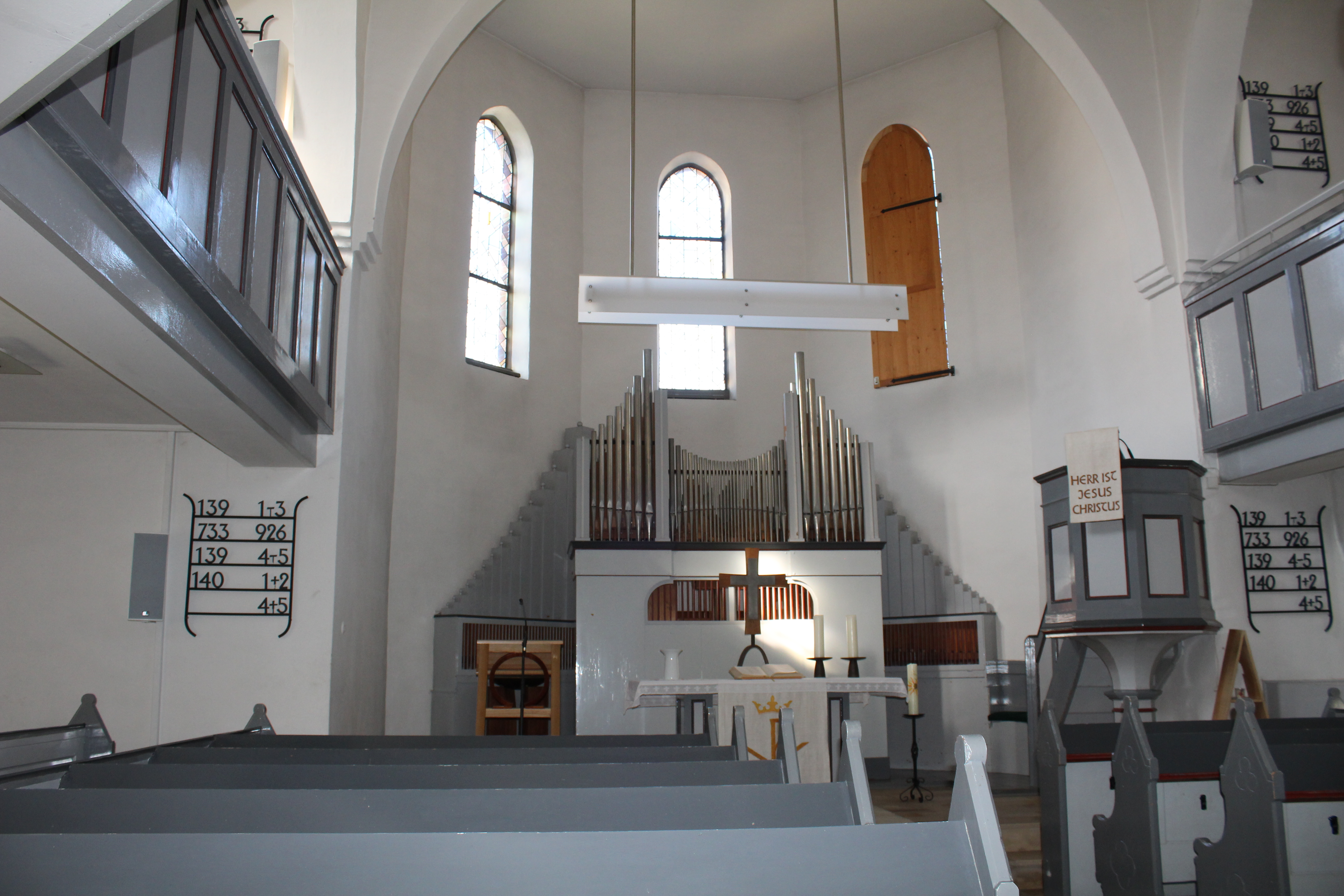 Ev. Kirche Wissenbach, Gemeinde Eschenburg, Hessen, Deutschland